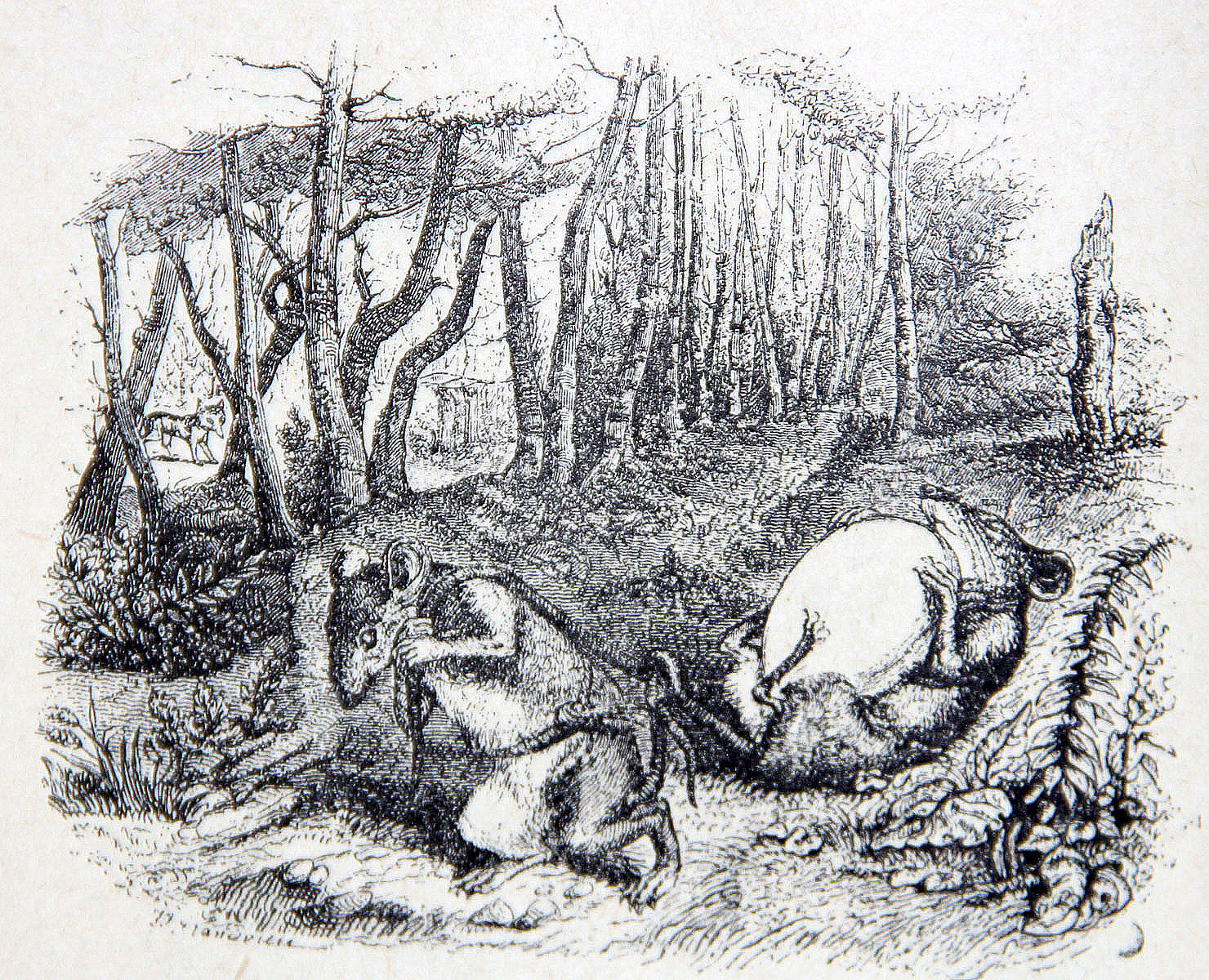 Illustration de Grandville pour la fable X, 1 de La Fontaine